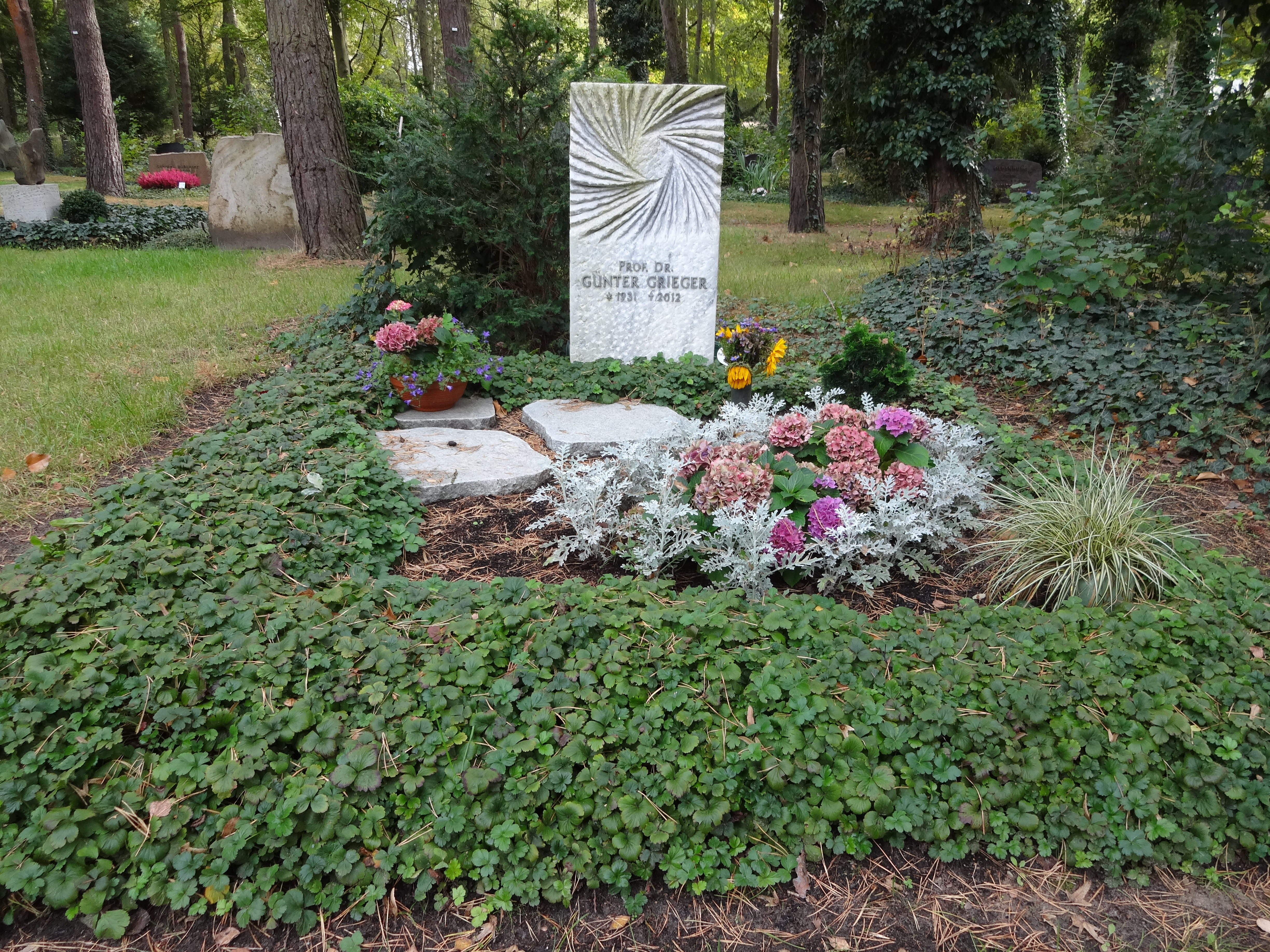 Grab von Prof. Günter Grieger auf dem Waldfriedhof Zehlendorf